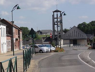 Mondrepuis (Aisne)rue de l'église, cropped